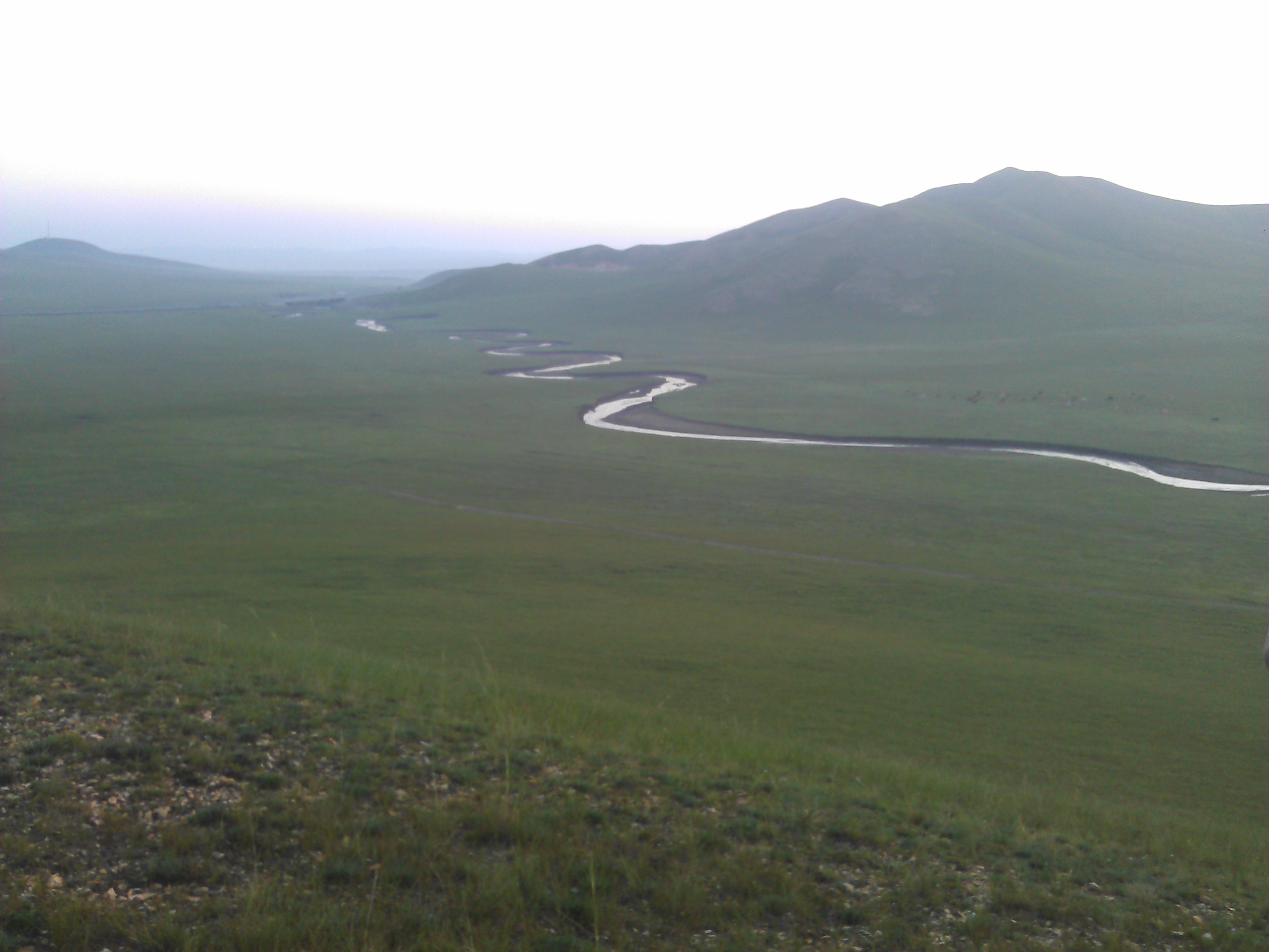 Huolin Gol, Tongliao, Inner Mongolia, China